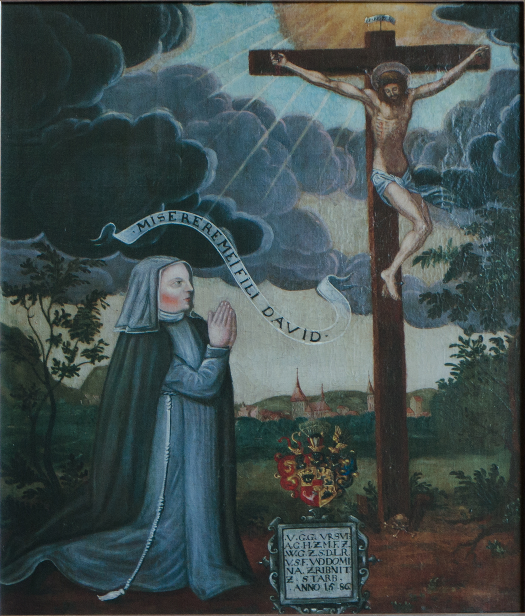 Klosterkirche Rühn Epitaph Ursula von Mecklenburg ohne Rahmen